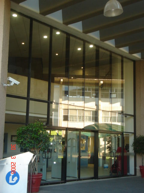 Fachada y entrada principal del CERI This is a photography of my university's front façade and main entrance which I took the on March 30, 2006.